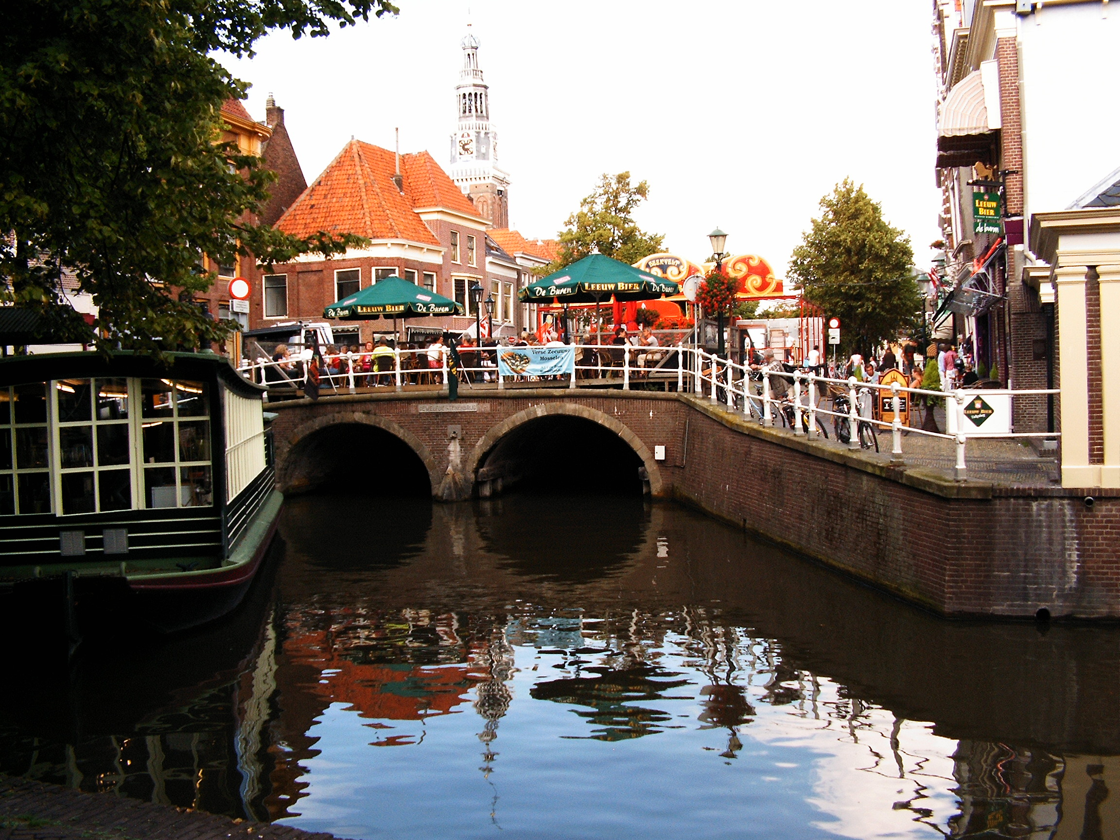 Alkmaar - Gewelfde stenen brug